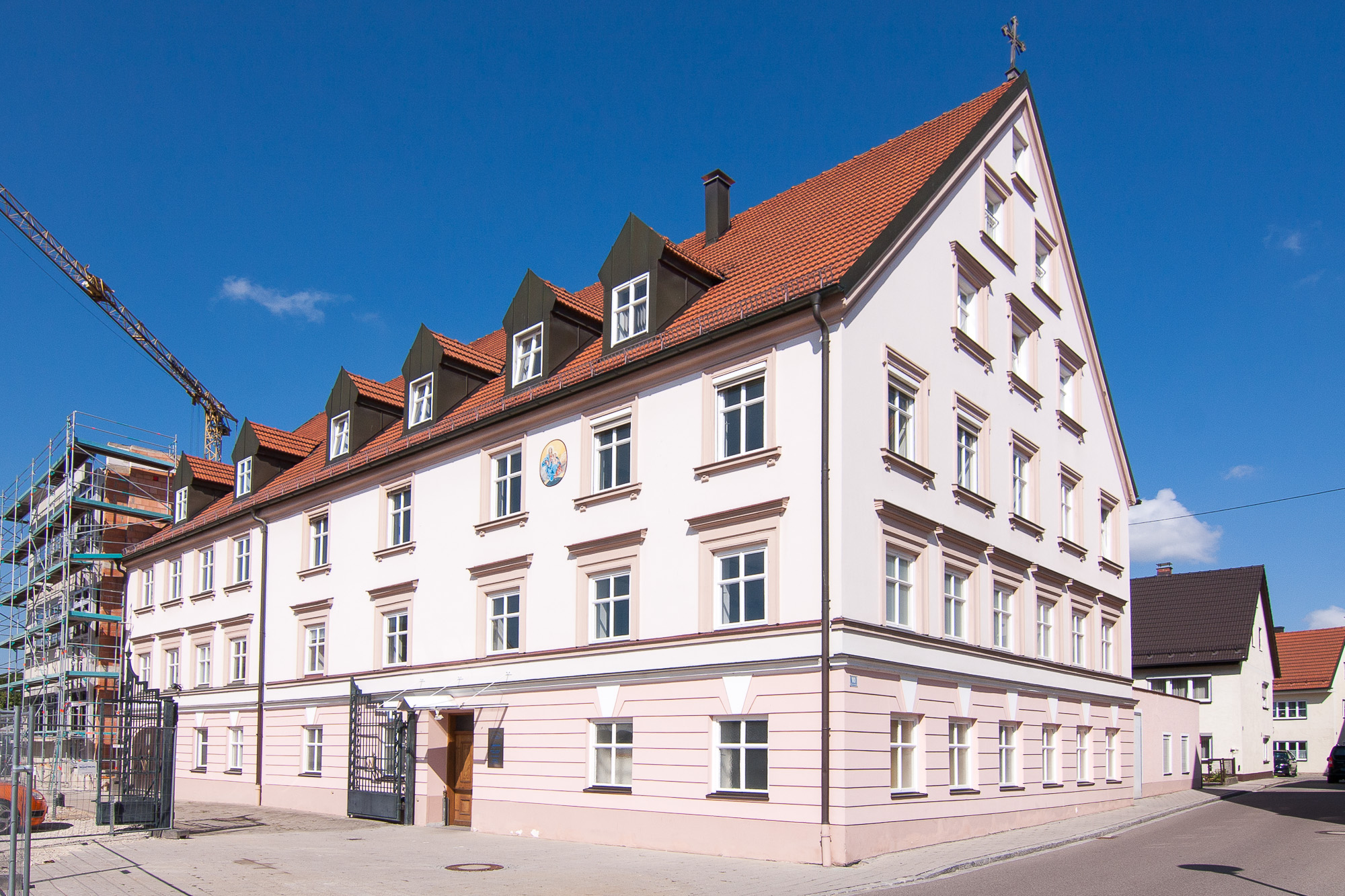 Pfarrhaus; 1854This is a photograph of an architectural monument.